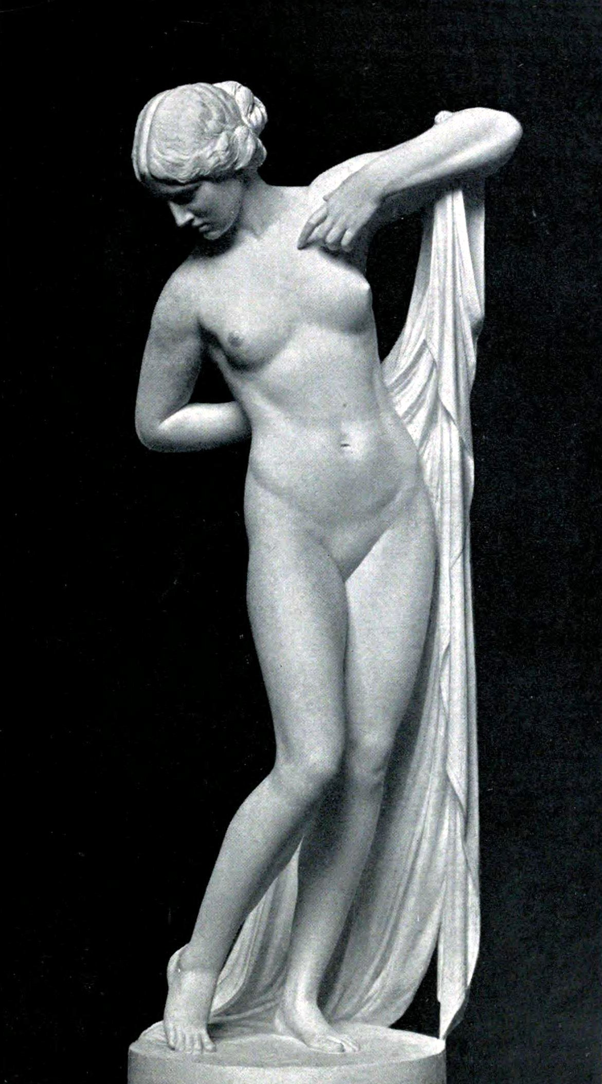 Phryne